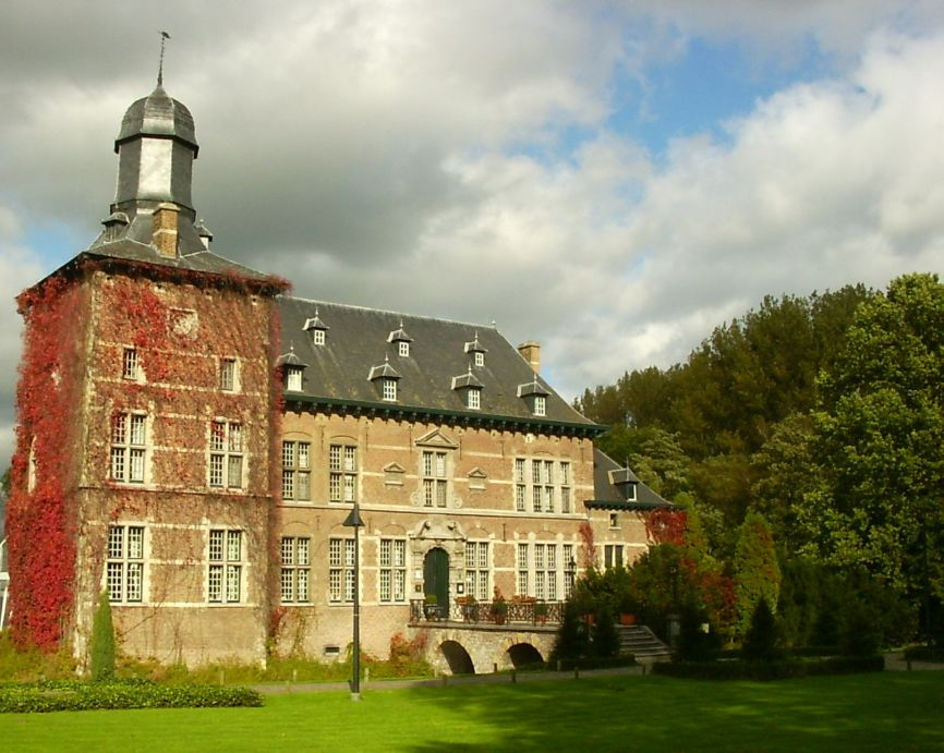 kasteel van Rullingen - eigen foto categorie:afbeelding kasteel